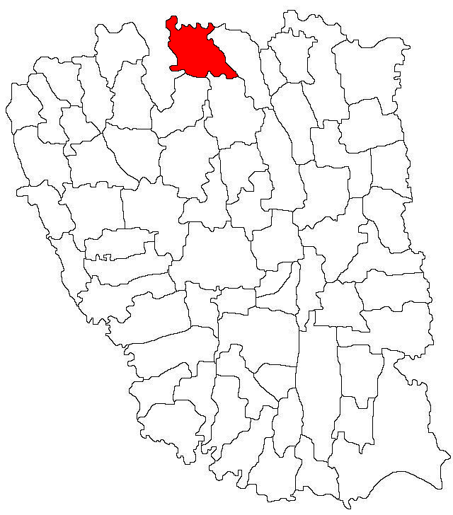 Categorie:Hărţi ale judeţului Galaţi